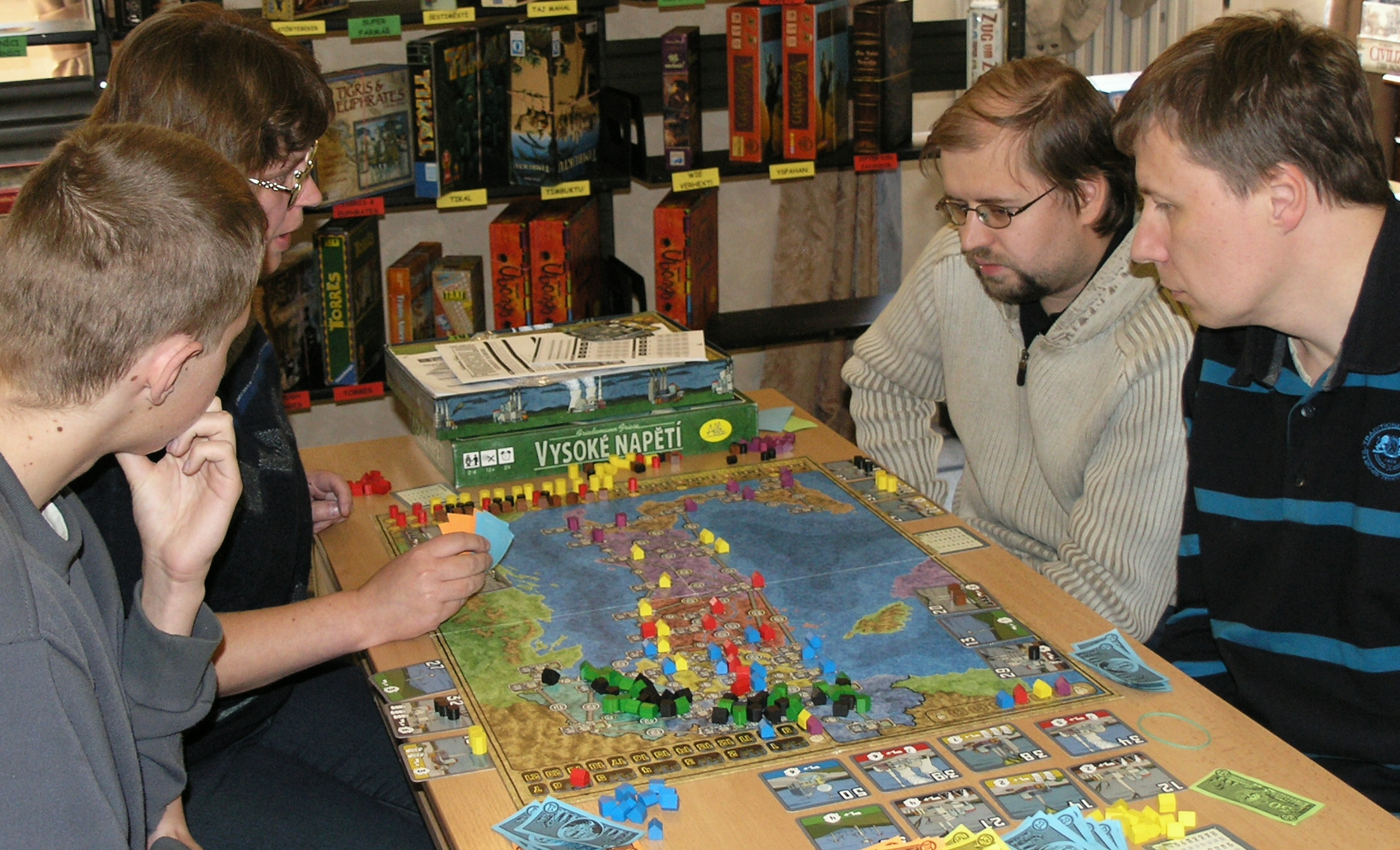 Deskohraní 2008